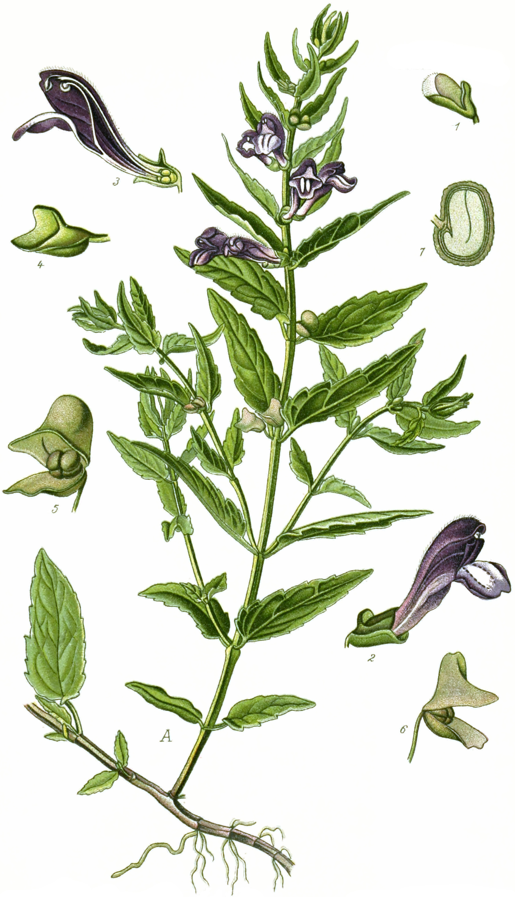 A Teil der blühenden Pflanze. 1 Knospe; 2 Blüte; 3 Blütenlängsschnitt; 4 Fruchtkelch geschlossen, nach oben die Hohlschuppe; 5 und 6 Fruchtkelch, gewaltsam geöffnet, von verschiedenen Seiten; 7 Same im Längsschnitte. 1 bis 7 vergrössert. Name Scutellaria galericulata L. Family Lamiaceae